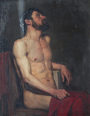 Pierre De Coninck, Académie d'homme demi-nu, 1854.